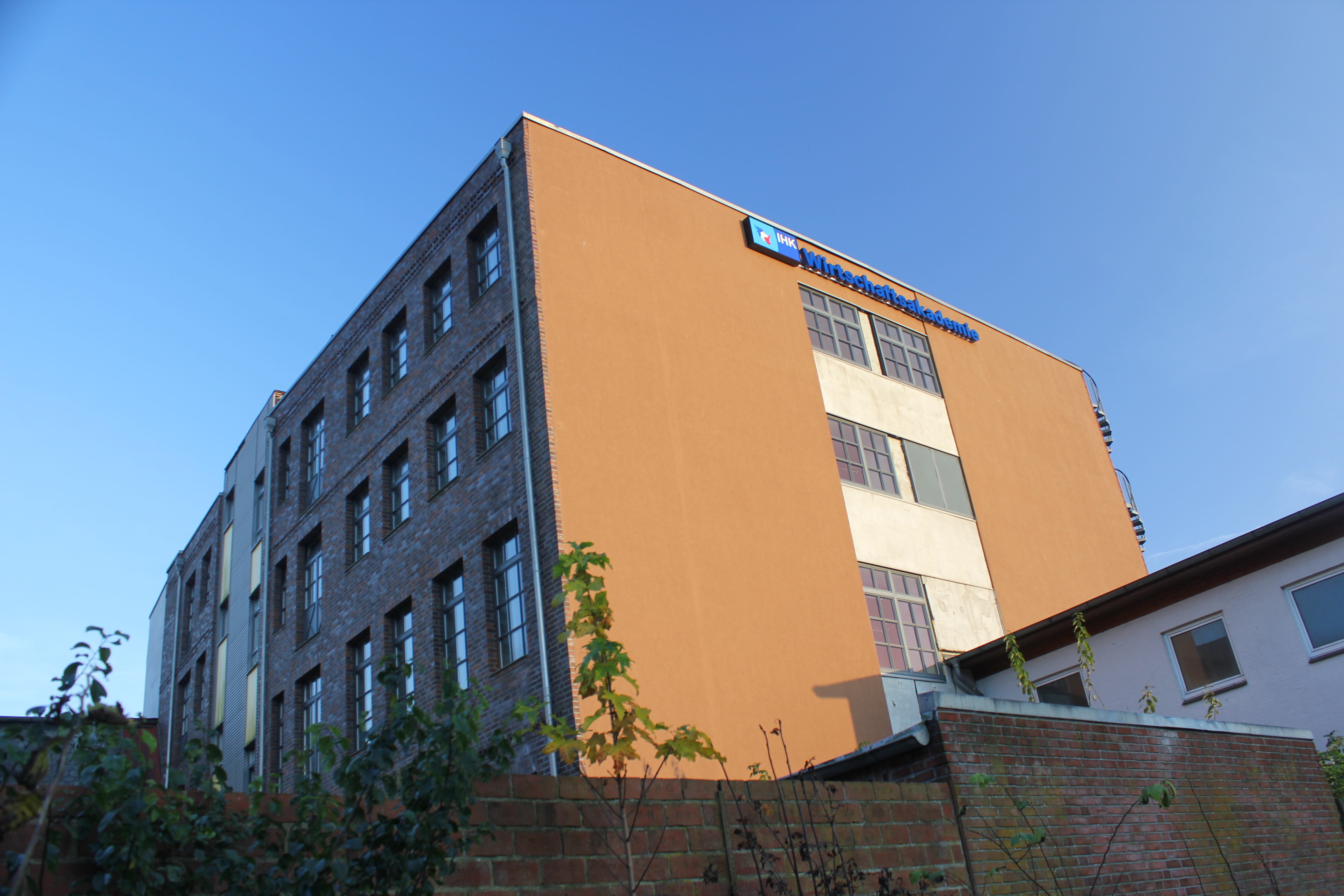 Wirtschaftsakademie Flensburg (Seitenansicht) -- Einer der drei tragenden IHK- Standorte (Flensburg, Kiel und Lübeck)